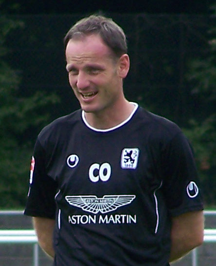 Markus Schroth, 1860 München